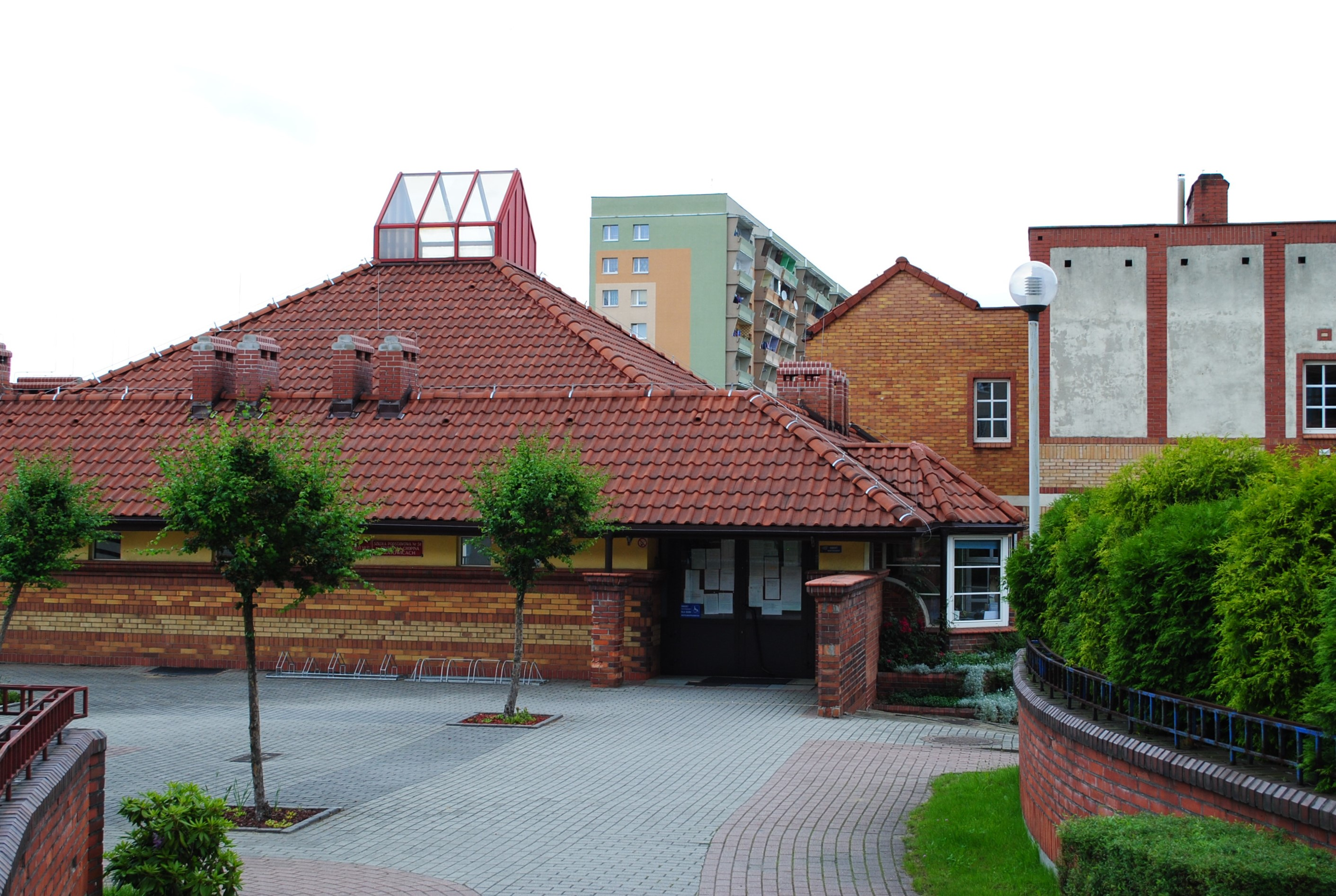 Katowice-Giszowiec. Ulica Przyjazna. Szkoła Podstawowa nr 51